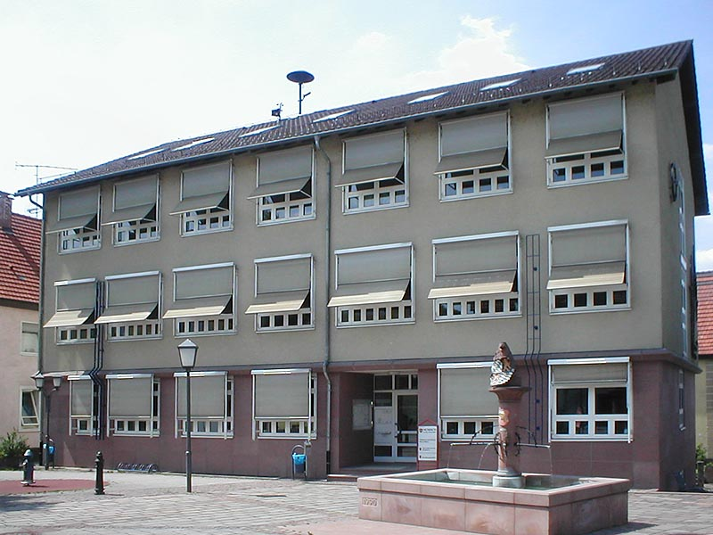 Rathaus in Mosbach-Neckarelz, erbaut 1964, renoviert 1994. Mit Brunnen von 1990